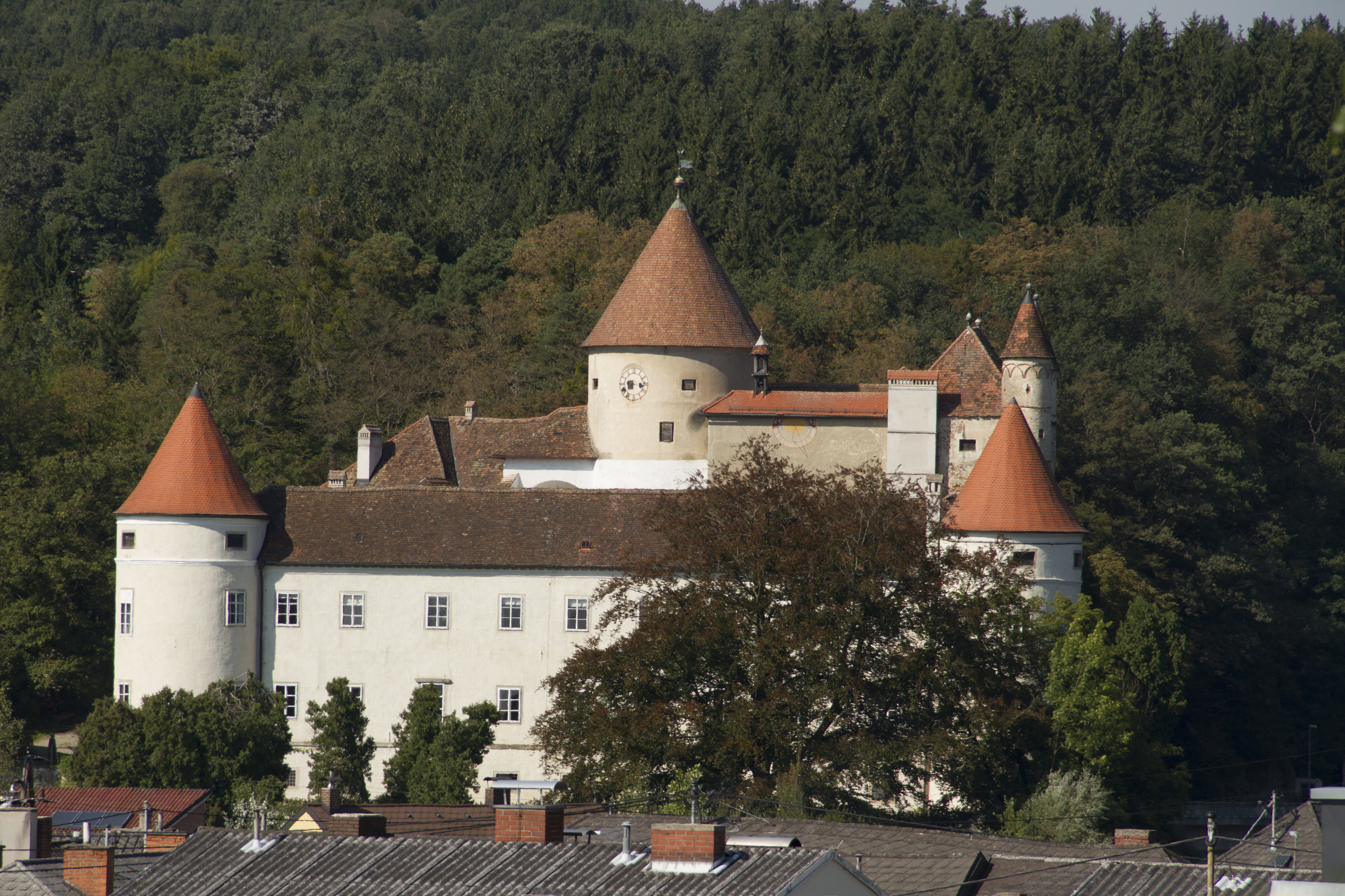 Schloss Schwertberg Aisttalstraße 1